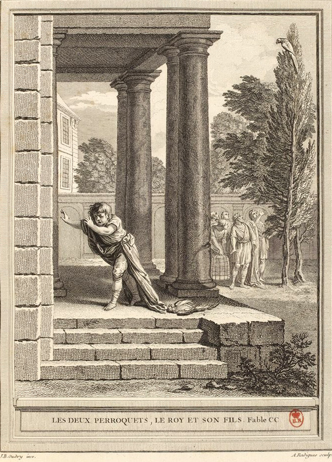 Gravure réalisée par Antoine Radigues d'après un dessin de Jean-Baptiste Oudry représentant la fable Les deux perroquets, le roi et son fils de Jean de La Fontaine (fable 11 du livre X). Cette gravure est parue dans l'édition complète des fables de La Fontaine, parue en quatre tomes chez l'éditeur Desaint & Saillant, rue saint Jean de Beauvais à Paris, 1755-1759.